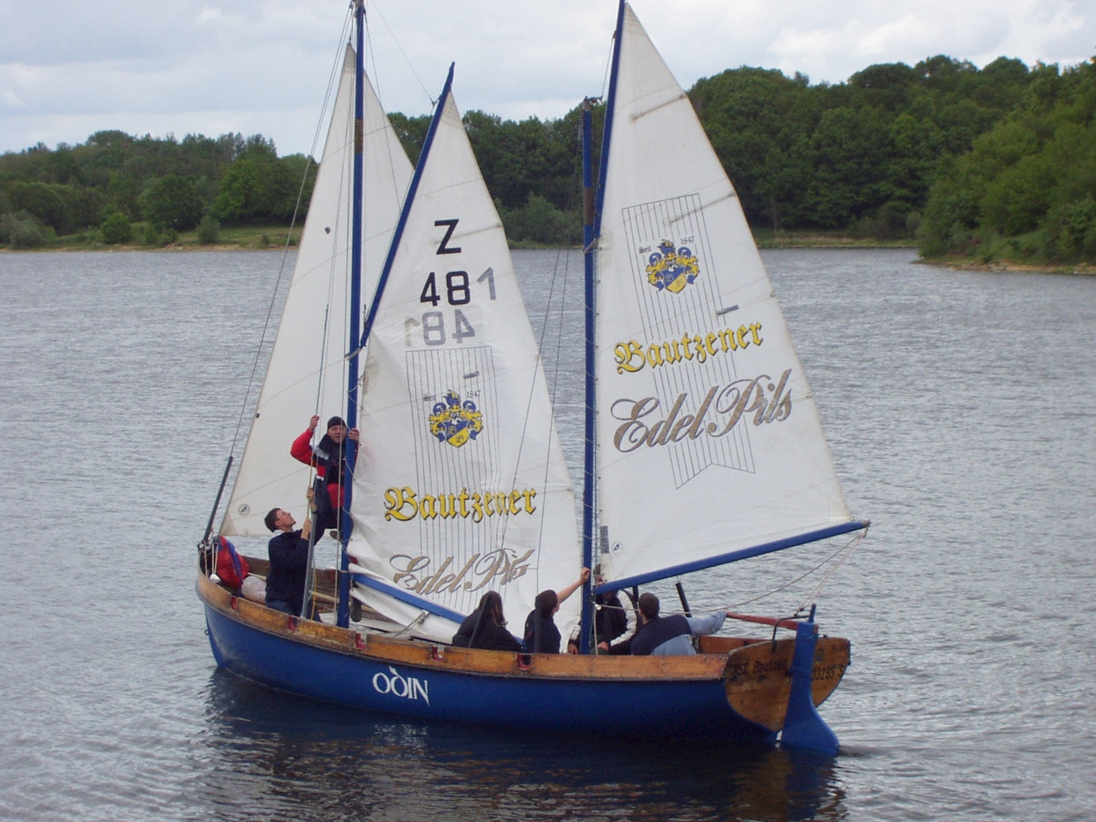 Segelkutter Odin des Seesportvereins Beeskow auf dem Bautzener Stausee.